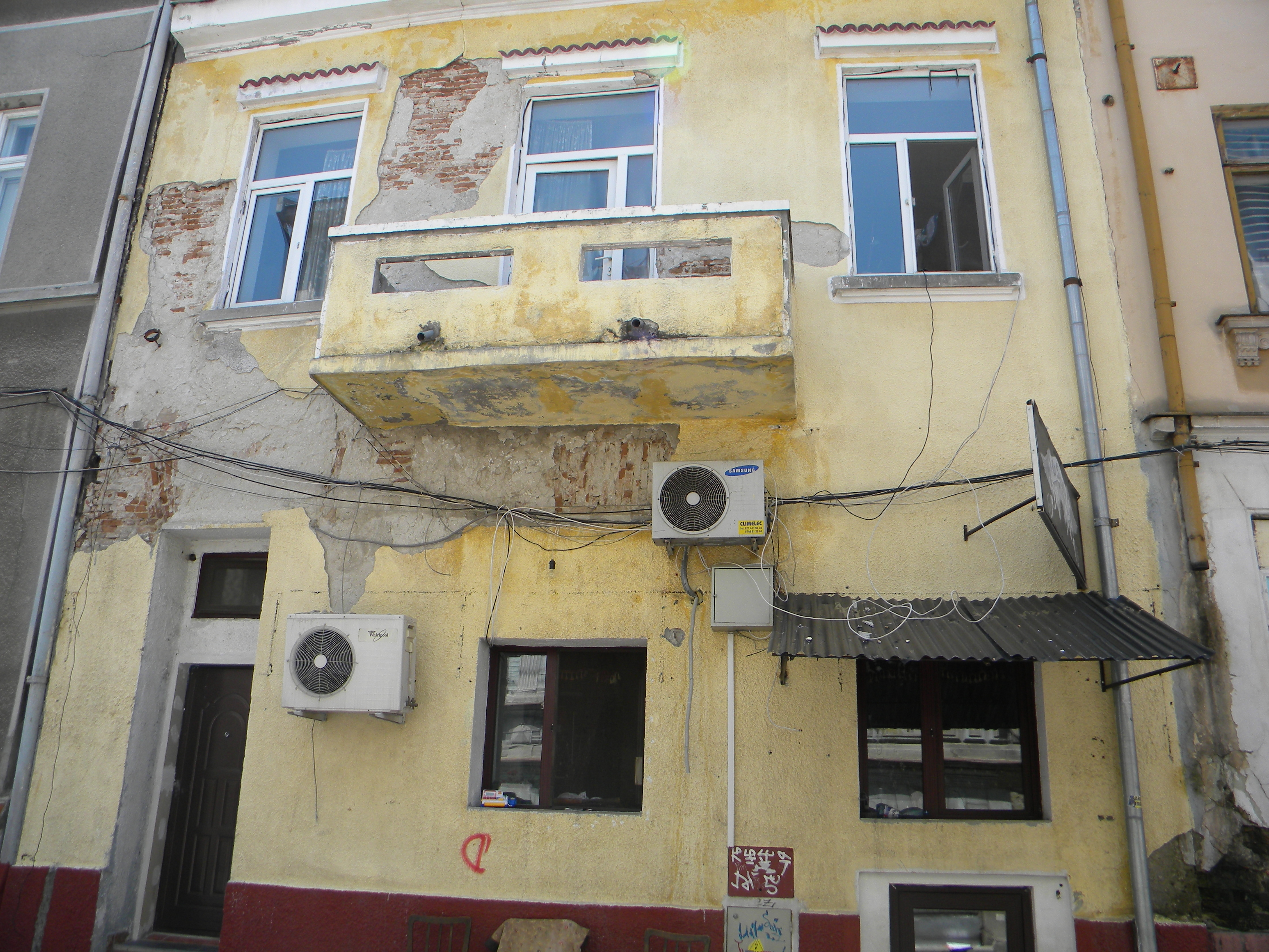 Bucuresti, Romania, Casa pe Str. Patrascu Voda nr. 10; B-II-m-B-19372